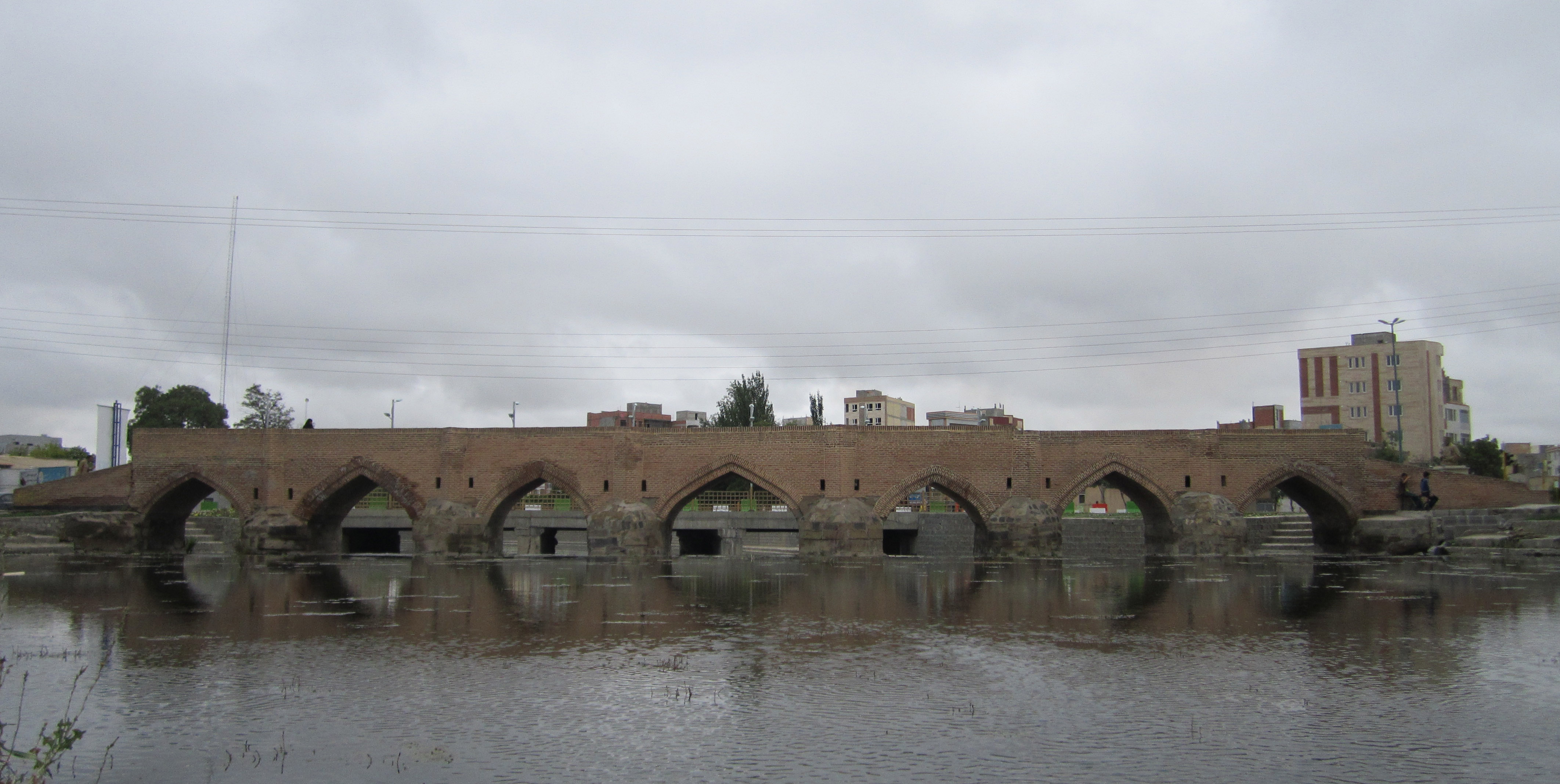 پل هفت چشمه (پل داشکسن)